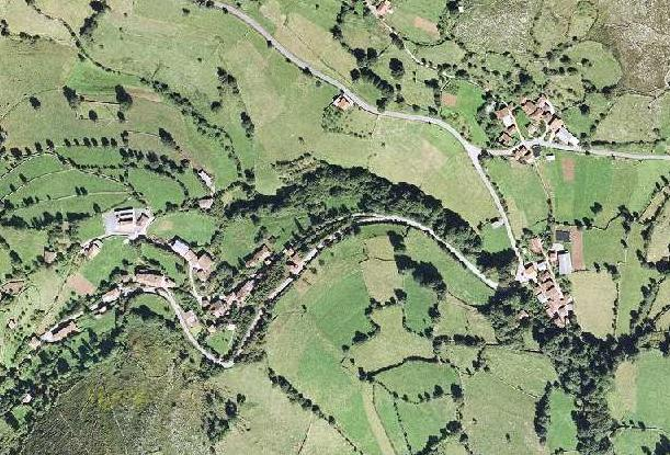 vista aérea de la parroquia de Rubiano (Grado), en el principado de Asturias. España.